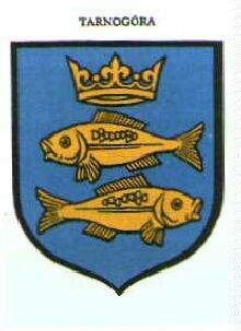 Herb wsi Tarnogóra.